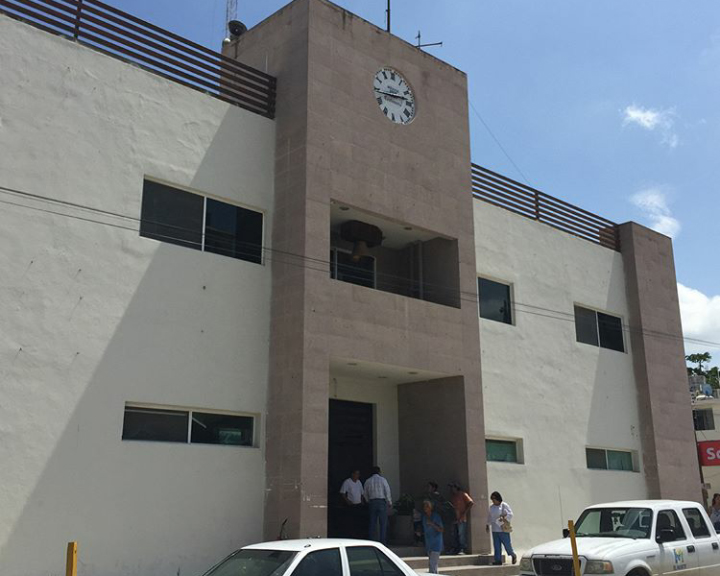 Presidencia Municipal, Ciudad Mante, Tamaulipas.